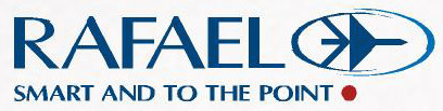 Logo